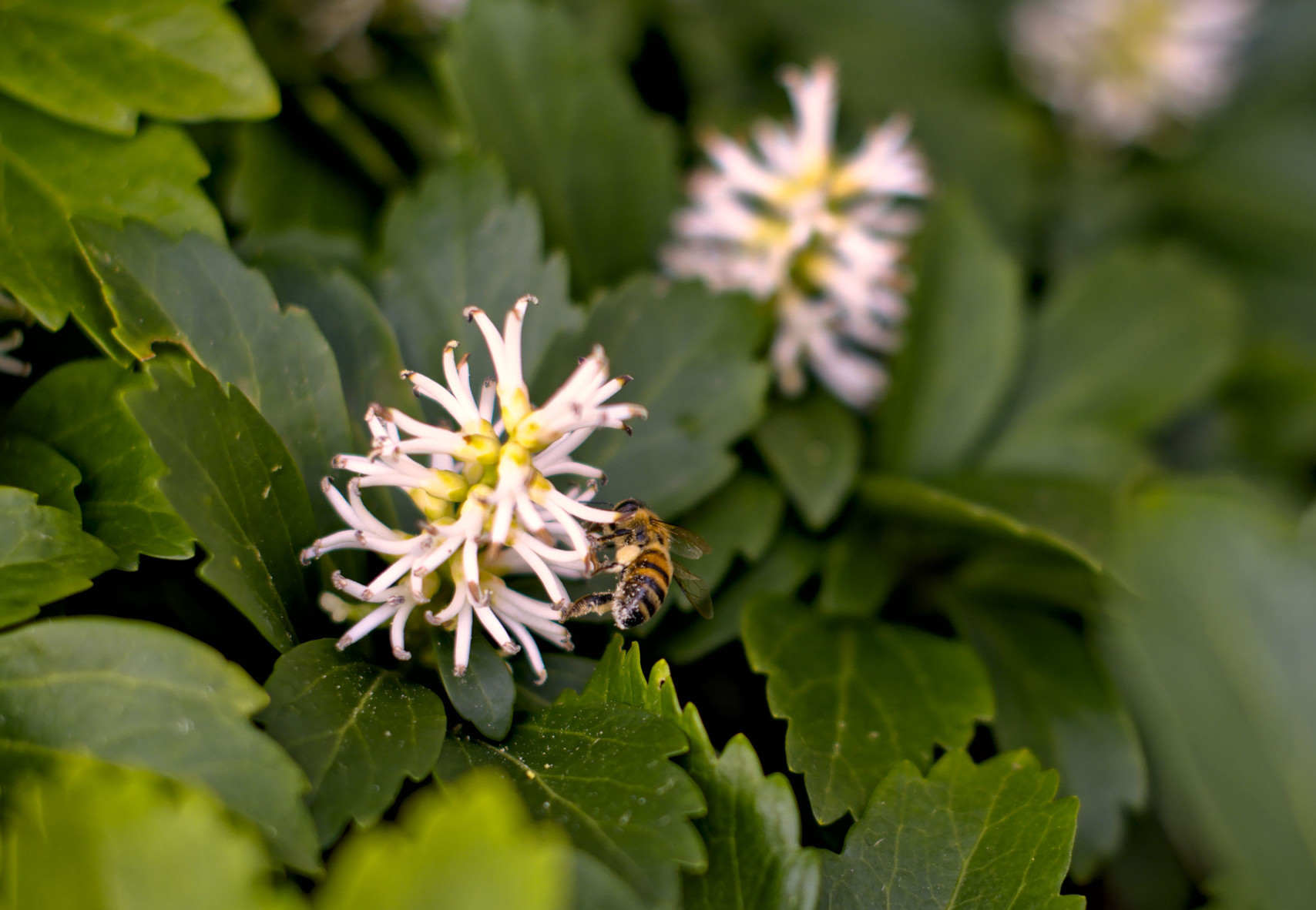 Blühte des Dickmännchen mit eine Insekten Standort: Bergen (Celle), Deutschland